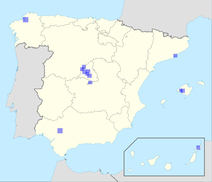 Lugares donde se encuentran Palacios Reales o residencias "oficiales" (usadas por el Monarca y adscritas a Patrimonio Nacional, salvo el Palacio de Marivent, el Palacio de Albéniz, a cargo de la Generalidad de Cataluña, los Alcázares de Sevilla, a cargo del Real Patronato del Alcázar de Sevilla y el Palacio de Mariñán, a cargo de la Diputación Provincial de La Coruña), donde puede residir el Rey y que puede usar para residir cuando se desplaza a esas ciudades. Referencias aquí, aquí, y aquí